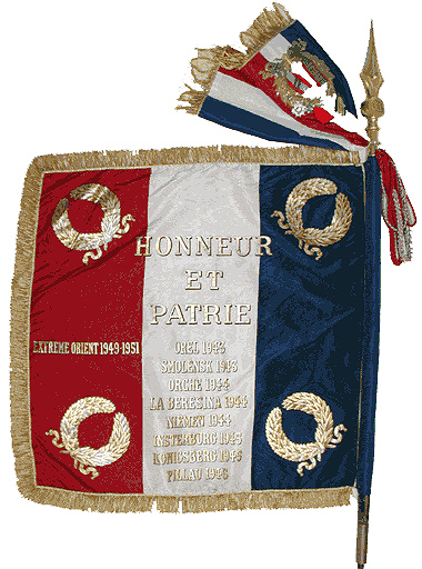 Drapeau du groupe de la France Libre "Normandie-Niemen" qui a combattu sur le front de l'est avec l'armée soviétique de 1943 à 1945, et aussi la campagne d'Allemagne en 1945.